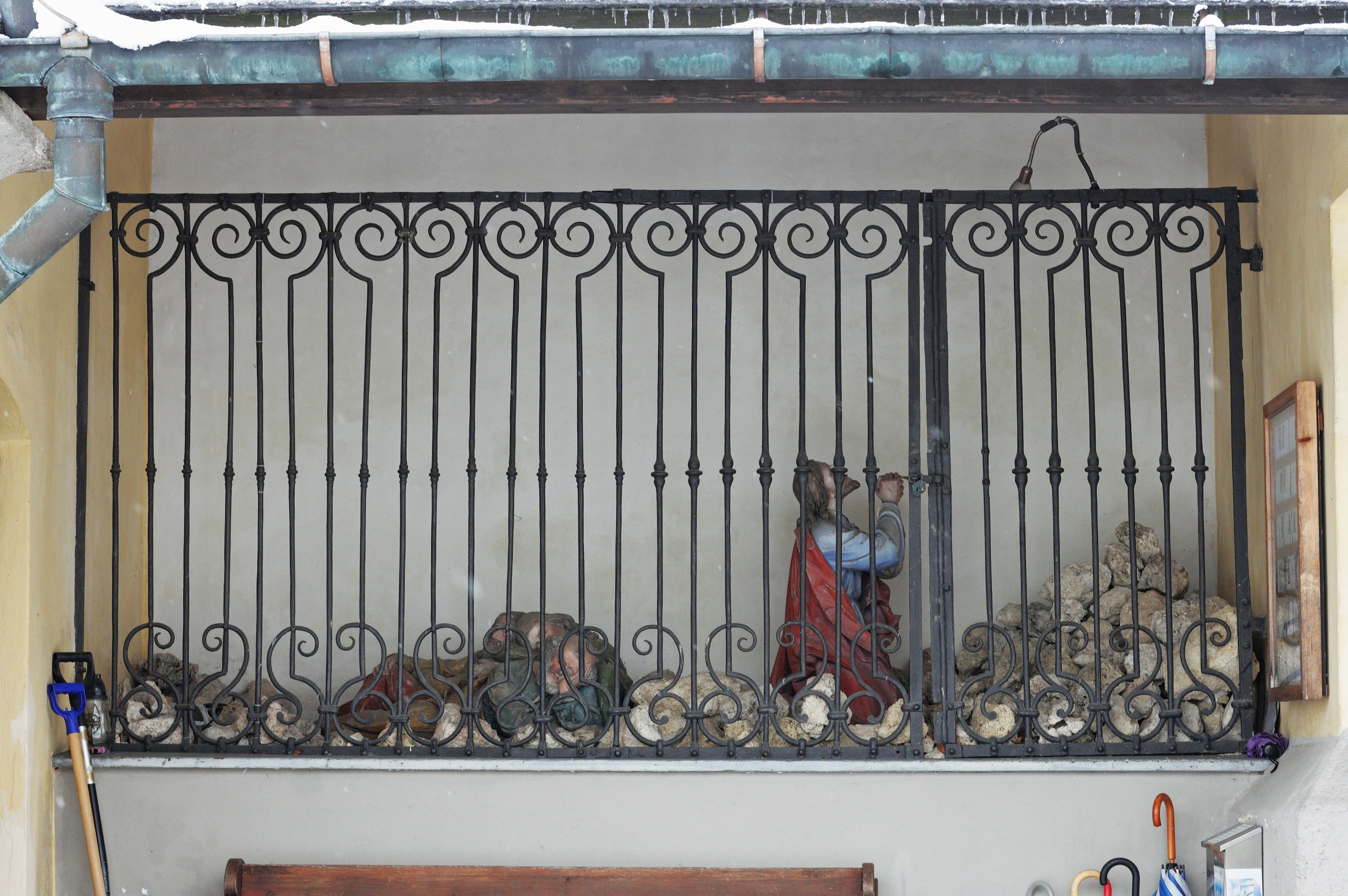 Ölberggruppe beim Haupteingang der Leonsteiner Pfarrkirche